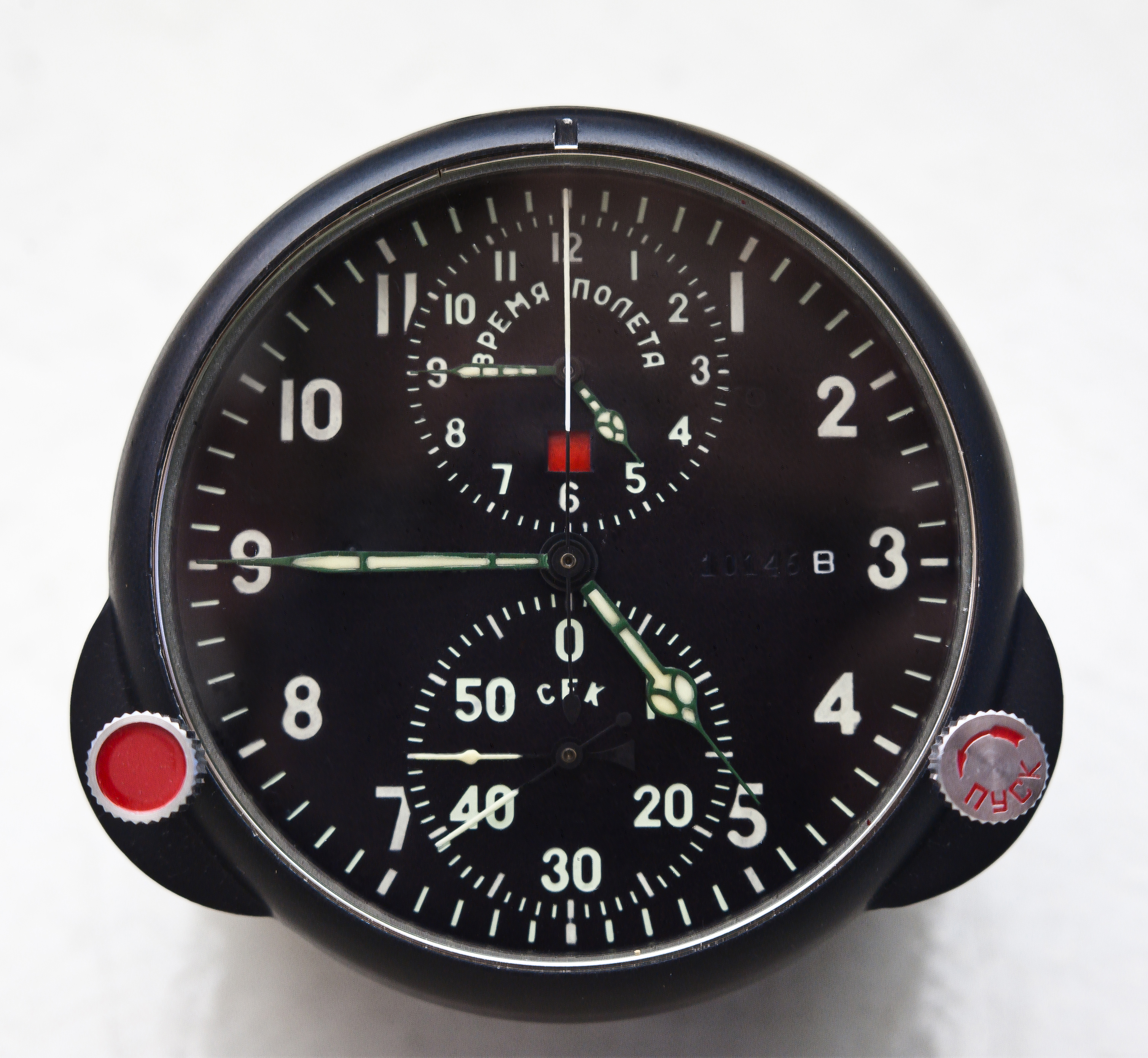 АЧС-1;В